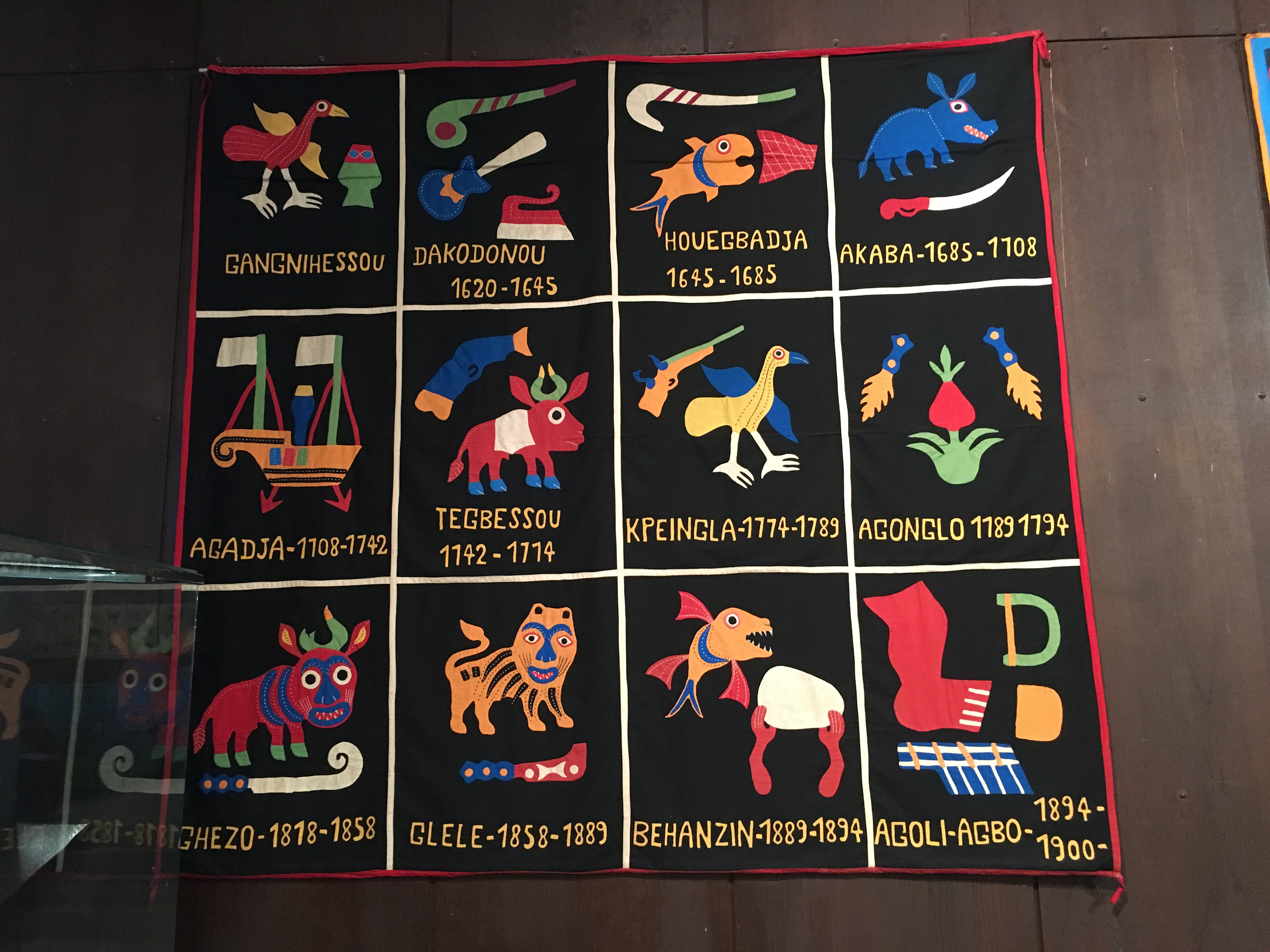 Srpski (latinica): Afrička kraljevska tkanina na kojoj su predstavljeni vladari, a ilustacije predstavljaju nešto što je karakteristično za same vladare ili ono što su govorili. Platno se nalazi u Muzeju afričke umetnosti u Beogradu.